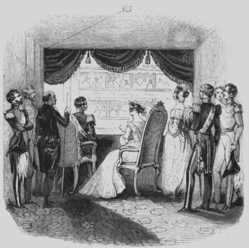 Die königliche Loge in der italienischen Oper in London.